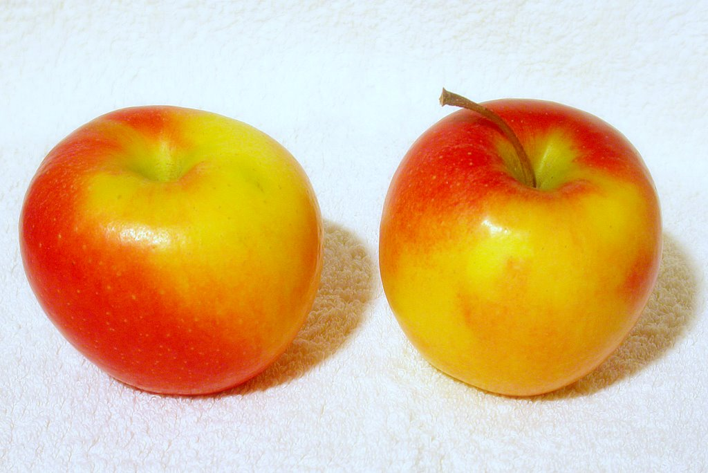 Jazz apples